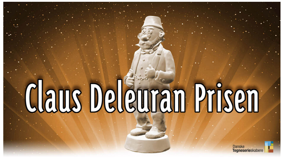 Claus Deleuran prisen